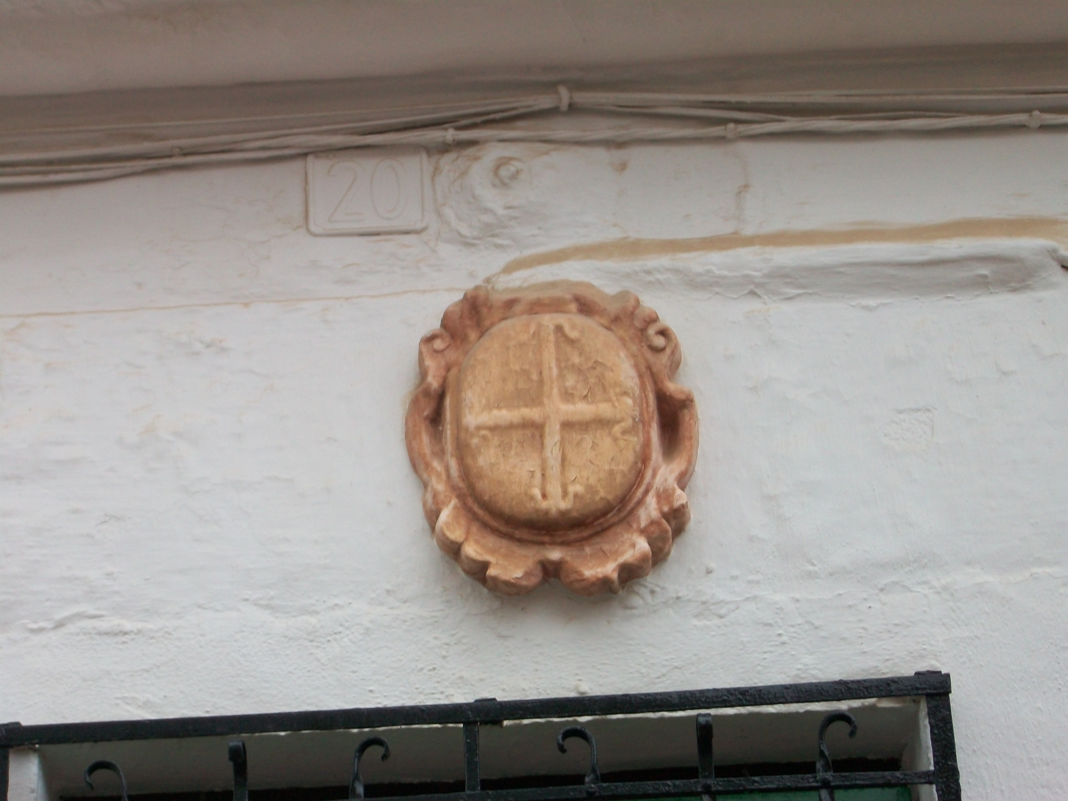 Escudo de la Orden de Santiago (?) de la Casa de la Torrecilla en la calle Virgen de Pedro Muñoz (Ciudad Real).